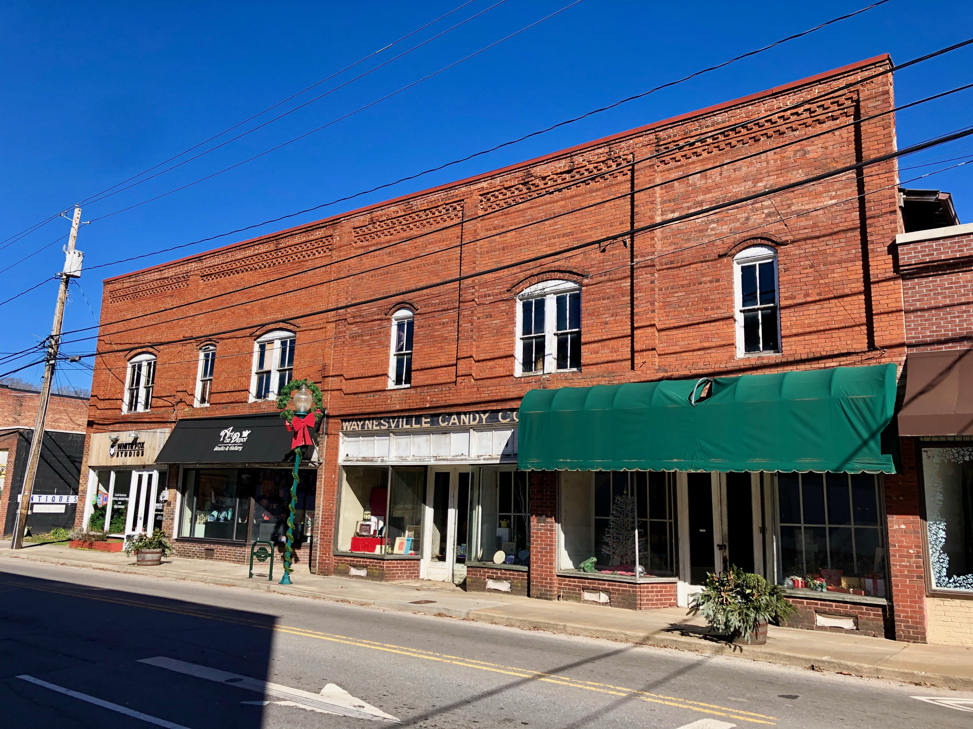 Depot Street, Waynesville, NC